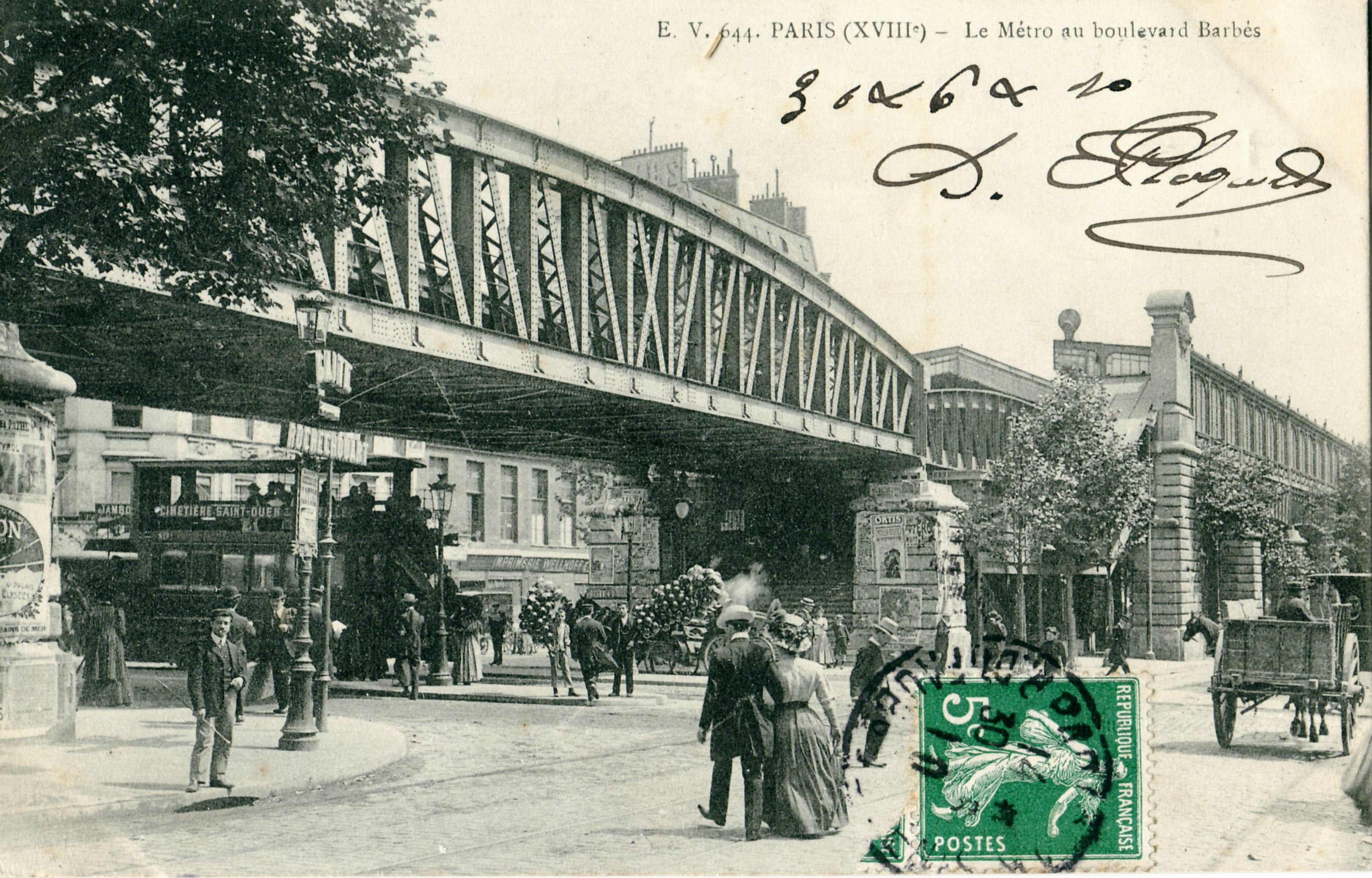 Carte postale ancienne éditée par BV N°644PARIS (IXe, Xe et XVIIIe arrondissement) : Le métro aérien à la station Barbès-Rochechouard le long du boulevard de la Chapelle, à la jonction des boulevards Barbès, de Rochechouard, de Magenta et de la Chapelle. Métro - ligne 2 et Tramway (ligne Cimetière de Saint-Ouen - Bastille) à impériale.